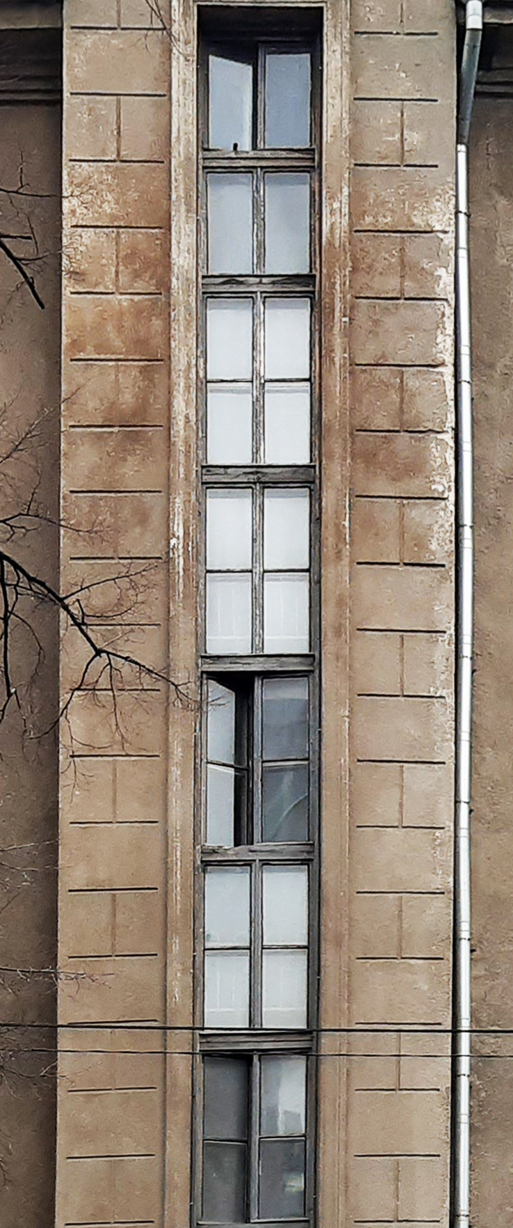 Вертикаль суцільно заскленої сходової клітки. Будинок на Інститутській, в якому мешкав А. В. Ніковський, публіцист, лідер партії УДРП (УПСФ), засуджений у справі Спілки визволення України, Київ, Інститутська вул., 22/7